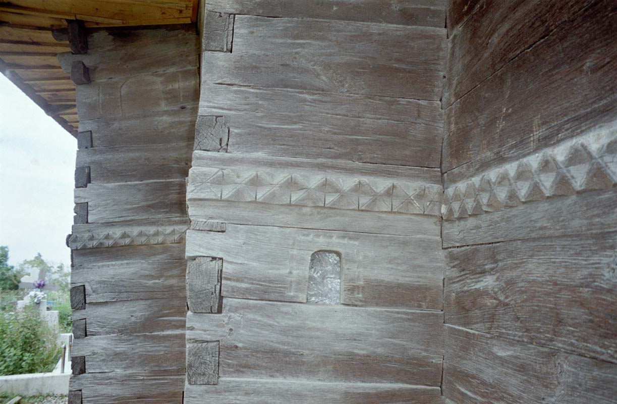 Miroslovești, Iași, datată 1756. Fereastră originală spre răsărit în absida sudică. Cheotori bisericești, netede.